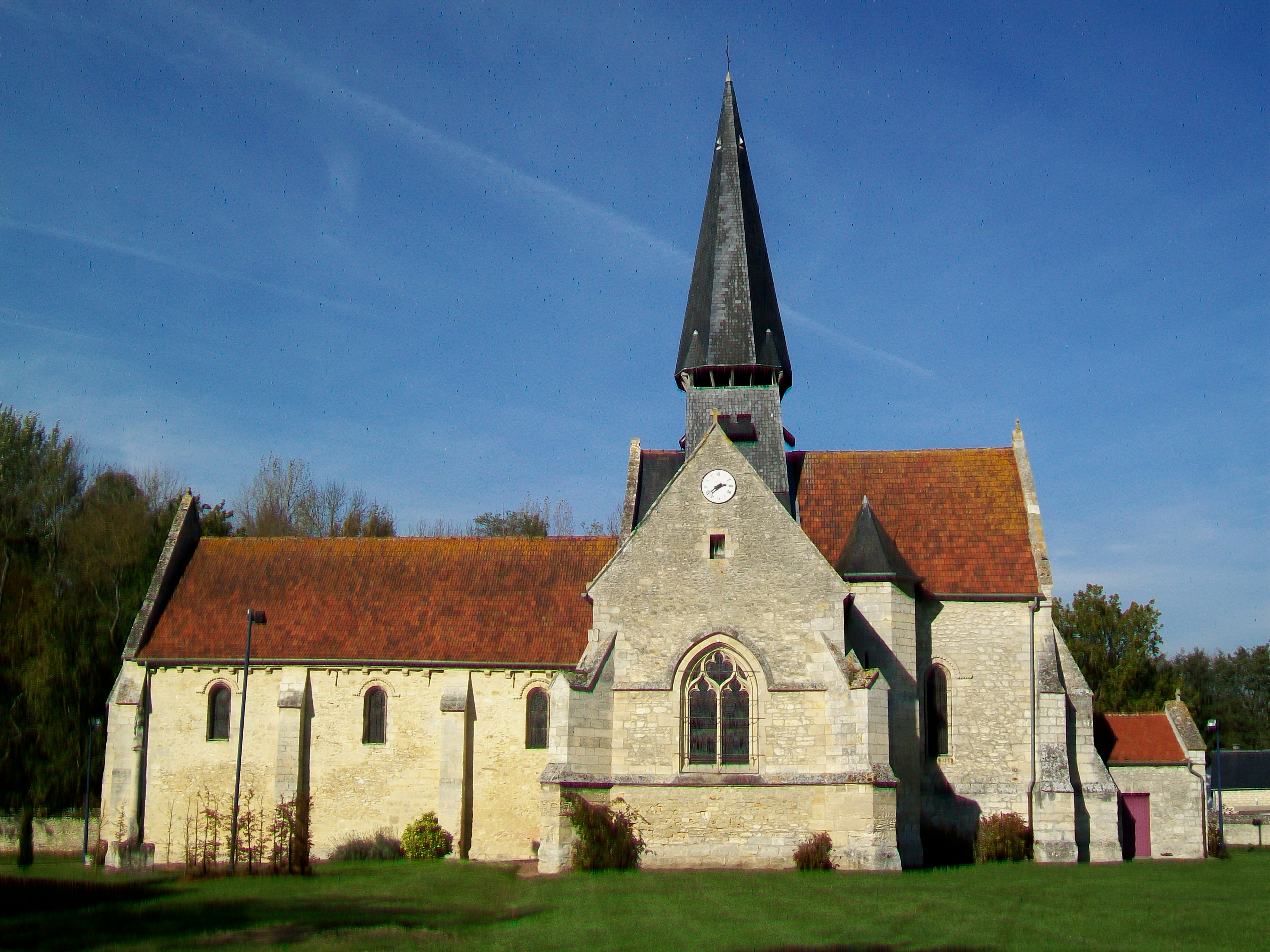 Vue sur l'église depuis le sud.